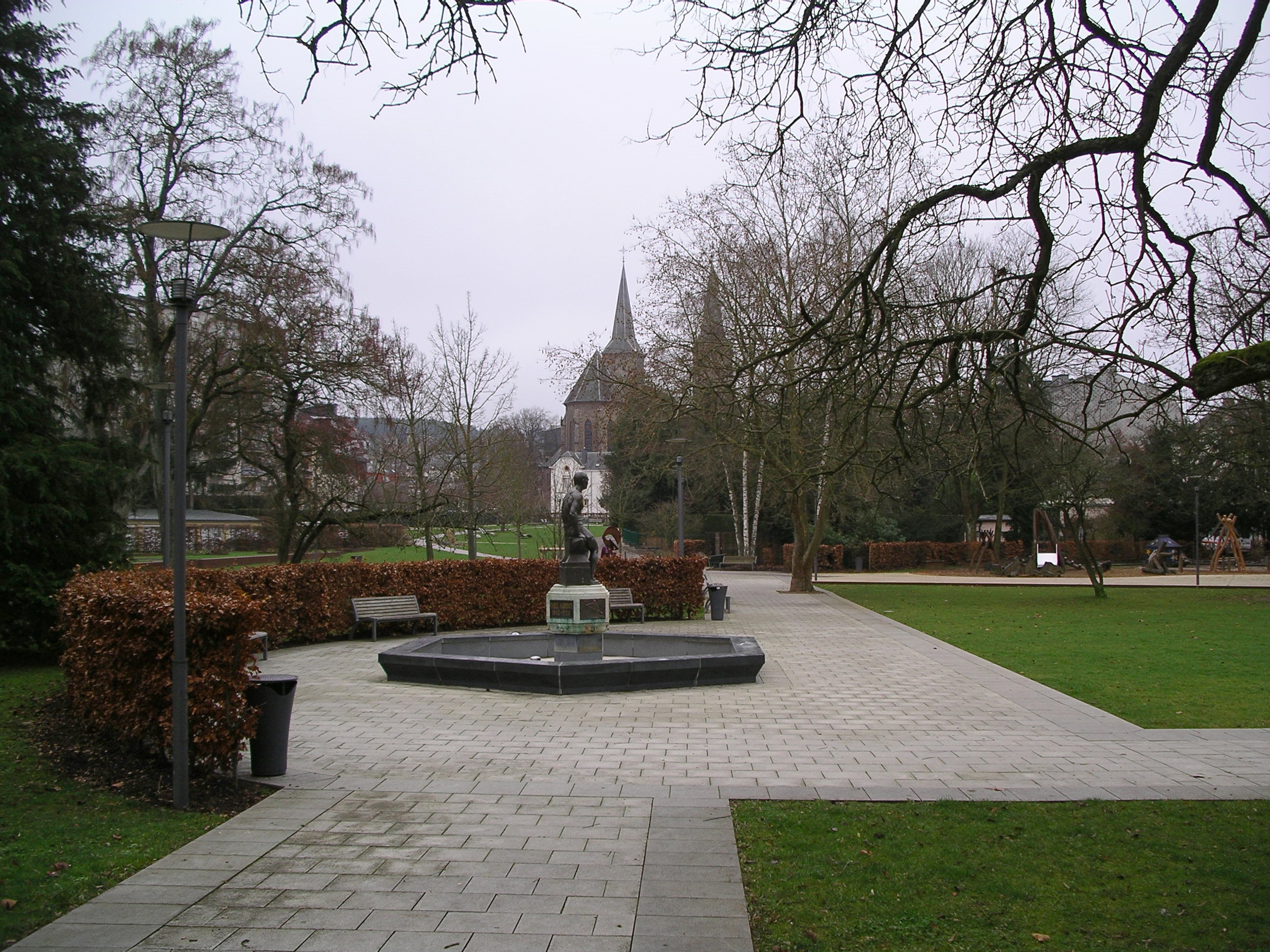 Dudelange, Park